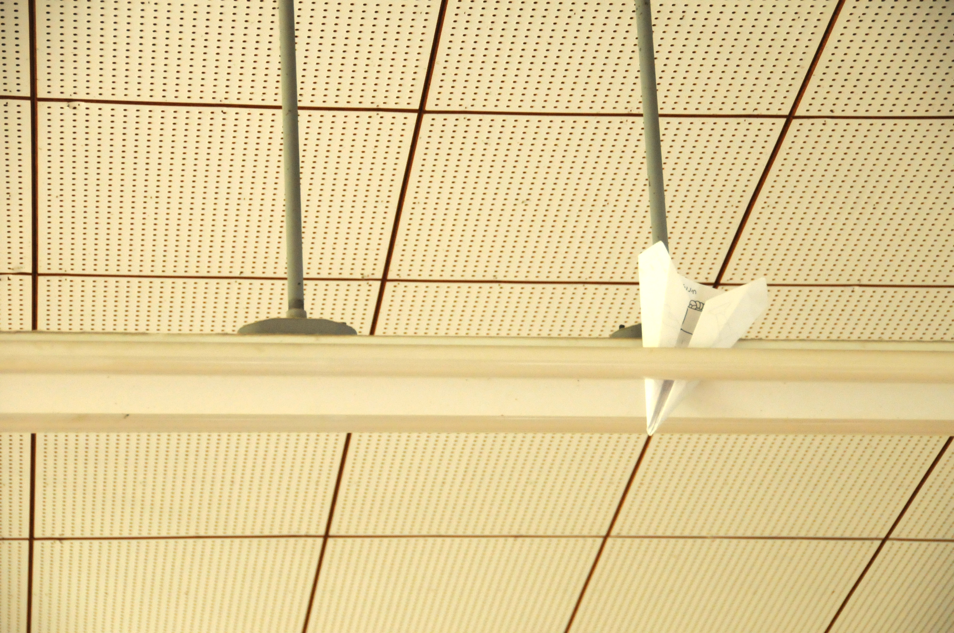 いつからこのままなんだろう [1] [2] 有孔ボード (有孔板)